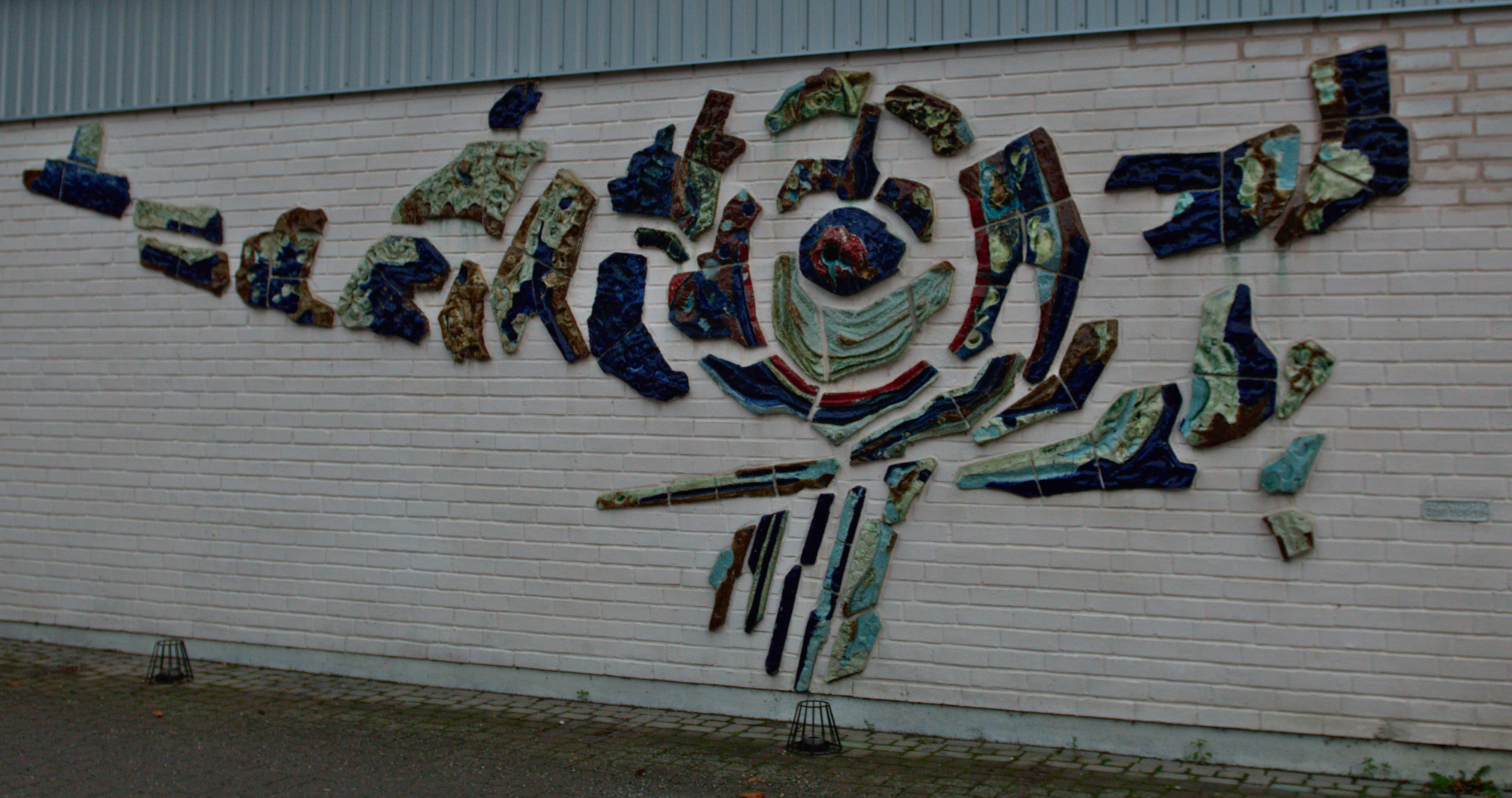 Odens öga av L-G Holmqvist år 1967. En keramikrelief placerad på Sundbyholms kursgård i Eskilstuna kommun.